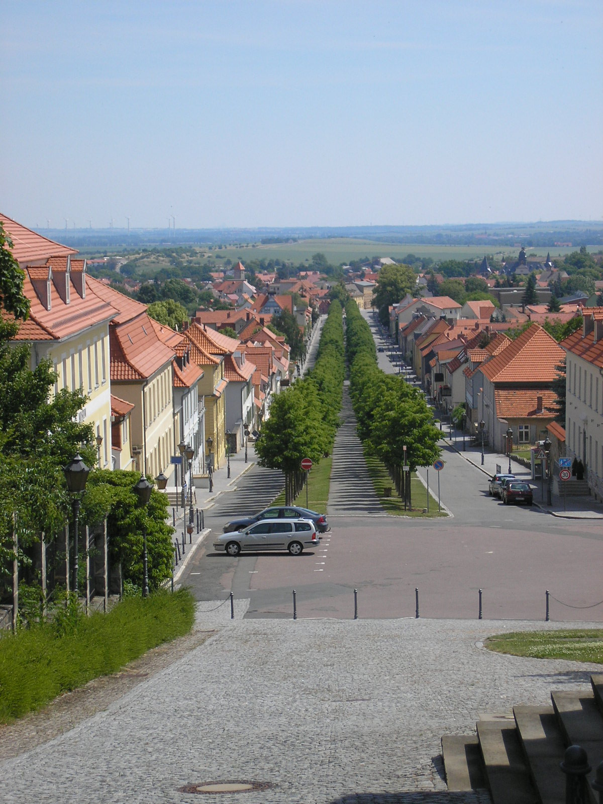 Blick durch die Allee zwischen Stadt und Schloss in Ballenstedt (Sachsen-Anhalt).